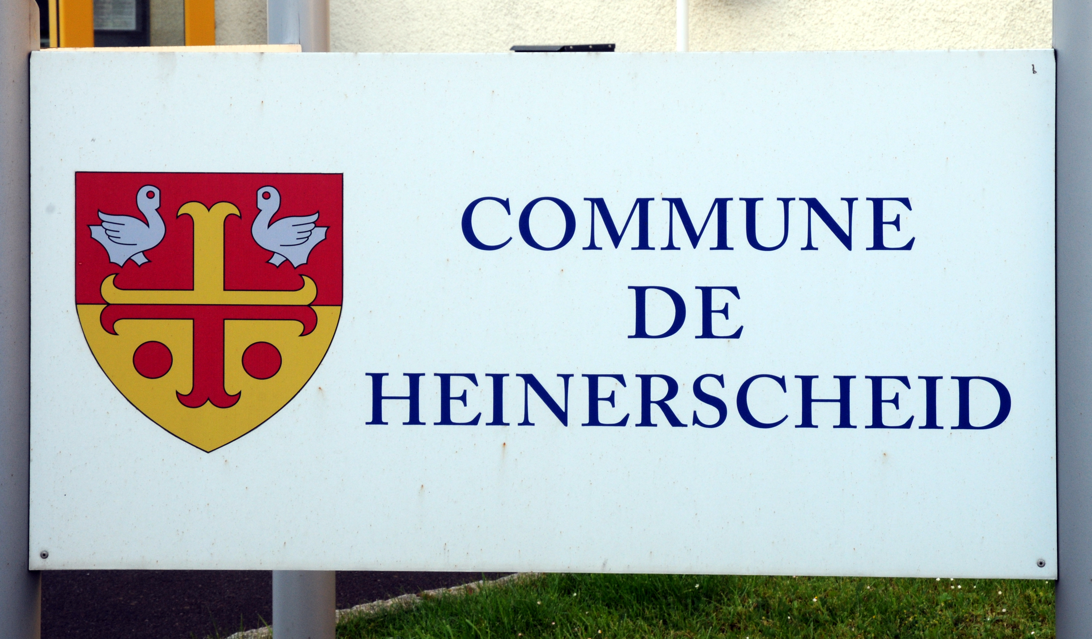 D'Schëld vrun der fréierer Märei zu Hengescht.